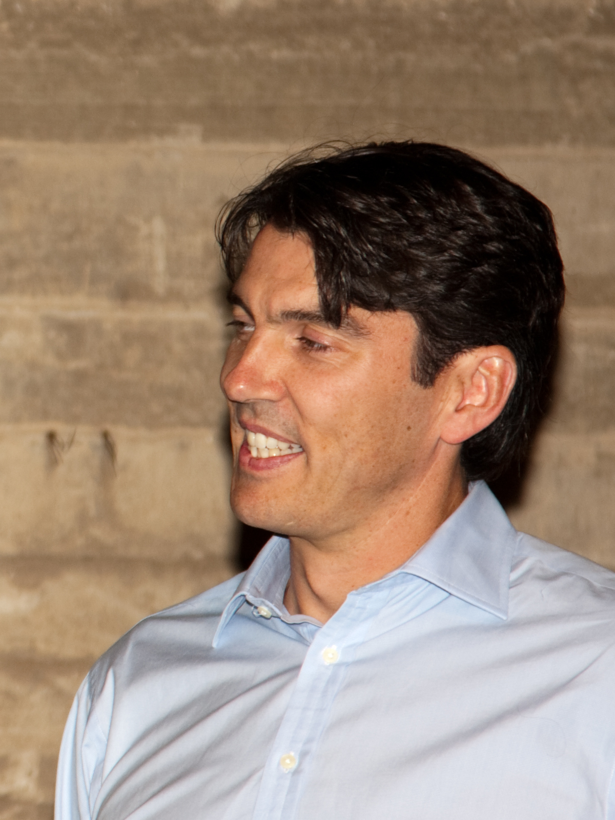 Tim Armstrong